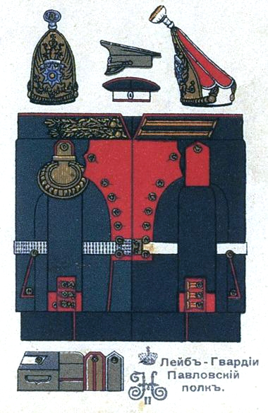 Форма обмундирования парадная лейб-гвардии Павловского полка. 1910 год.